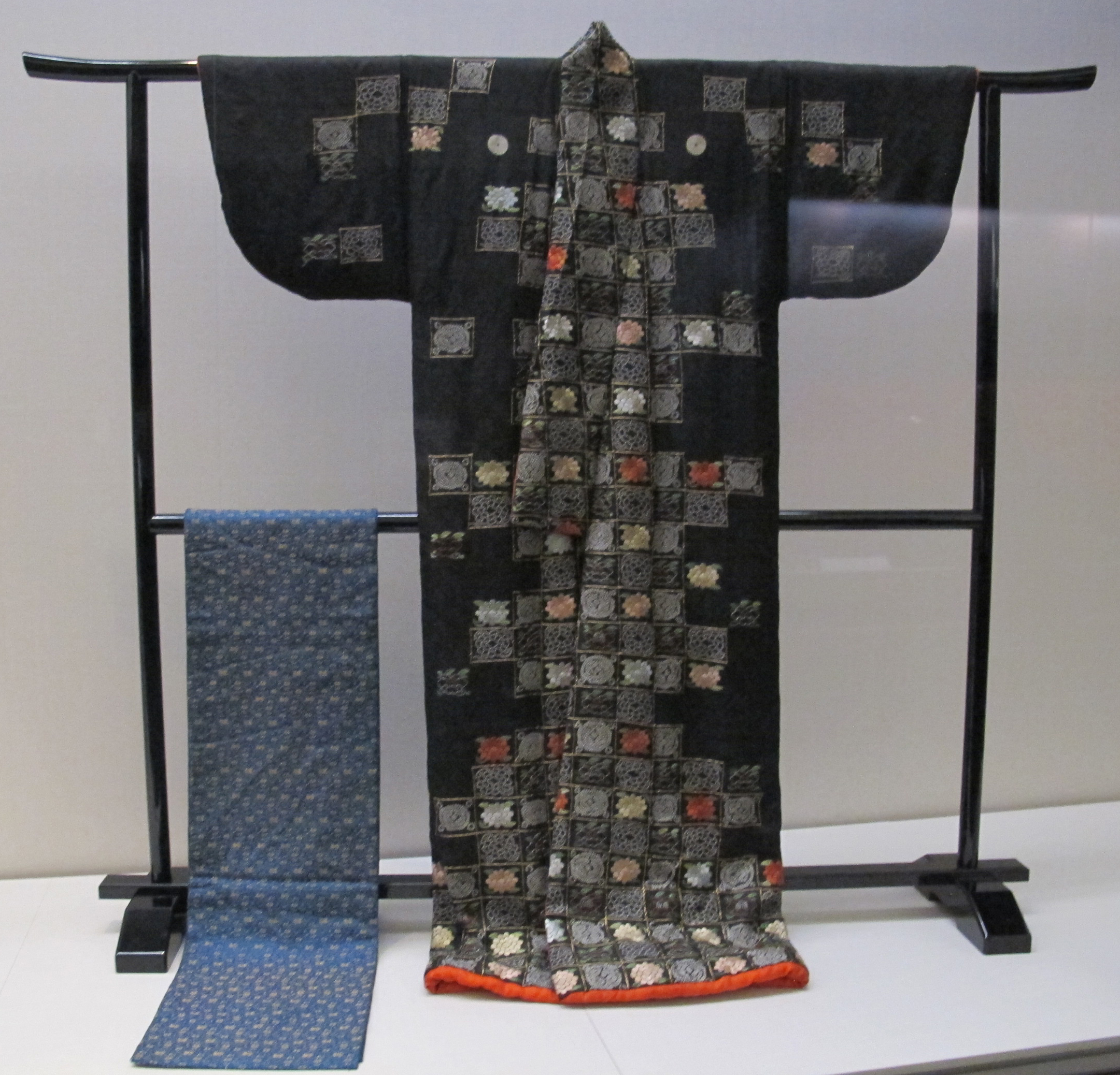 Periodo edo, obi e kosode, XIX sec.